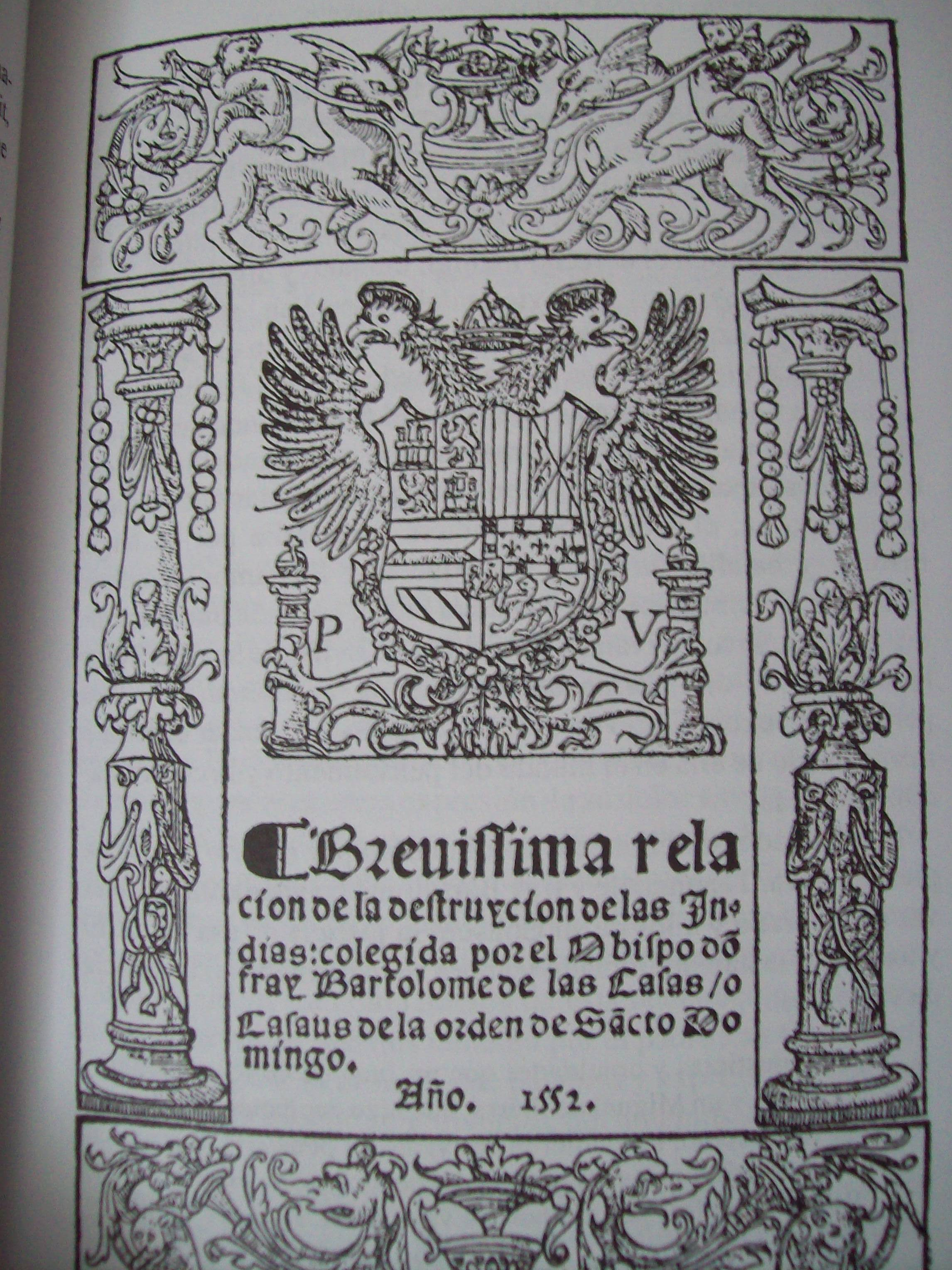 Portada de "Brevísima relación de la destrucción de las Indias" (1552) Bartolomé de las Casas